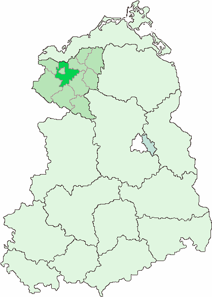 Skizze freihand erstellt Rauenstein 21:32, 3. Sep 2006 (CEST) HINWEIS: vorerst nicht für commons bestimmt.